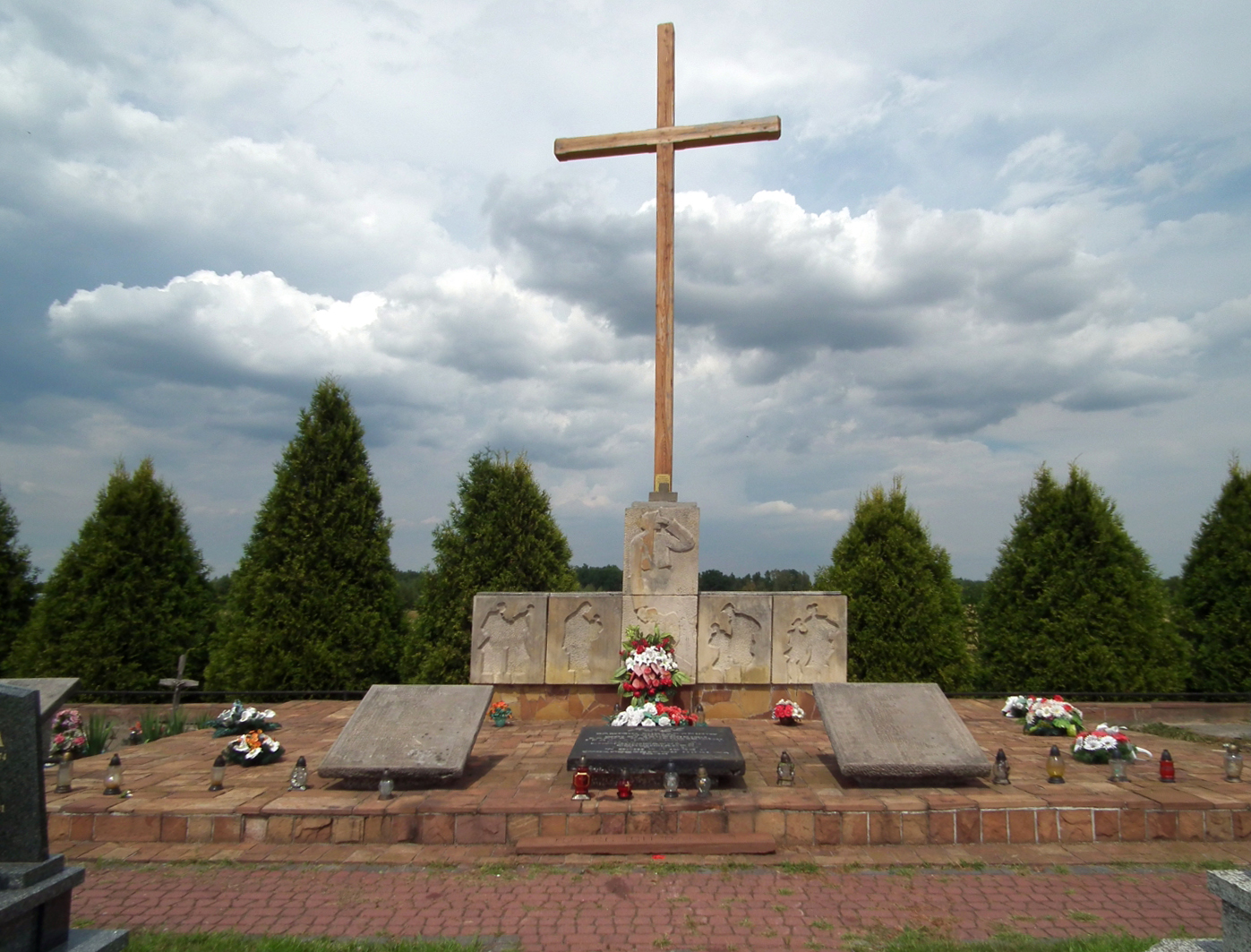 Borów - cmentarz kościelny w zespole kościoła parafialnego p.w. śś. Andrzeja i Józefa (zabytek nr A/100 z 30.11.1966)